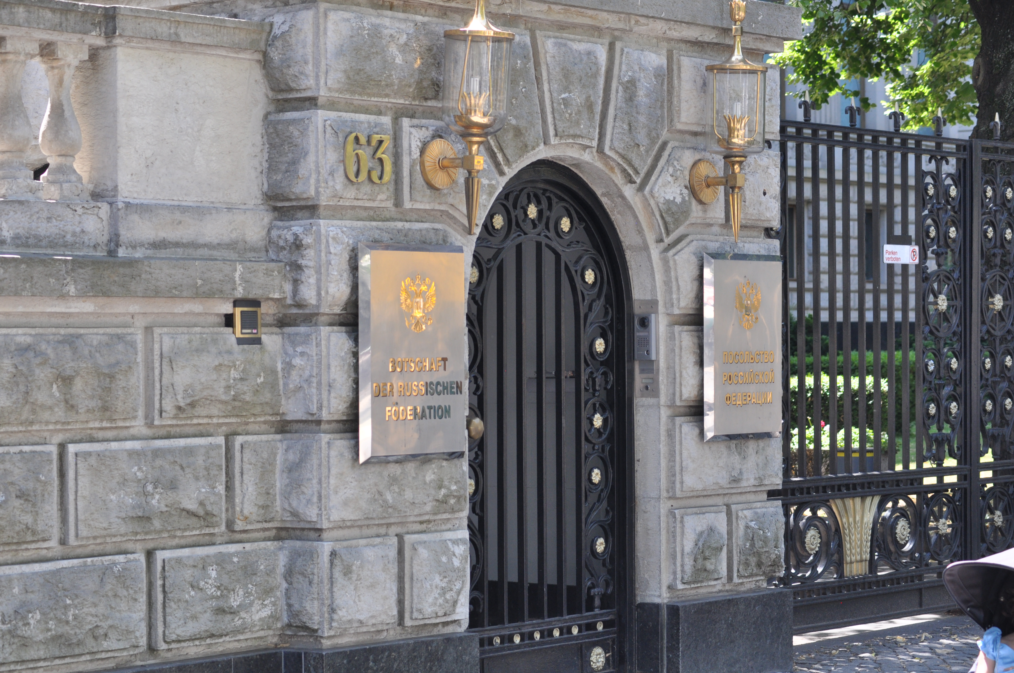 Berlin